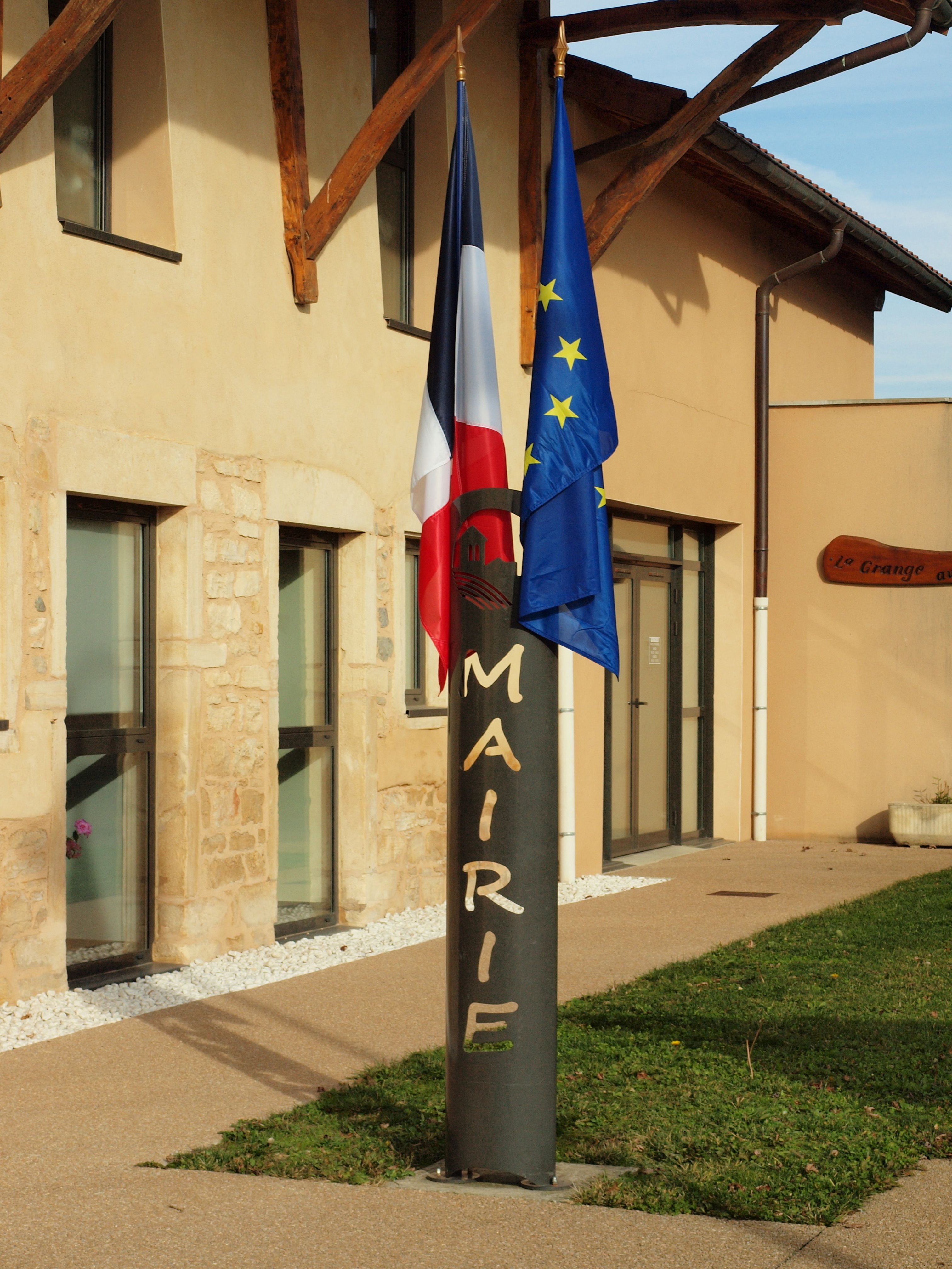 Chèzeneuve (Isère, France)